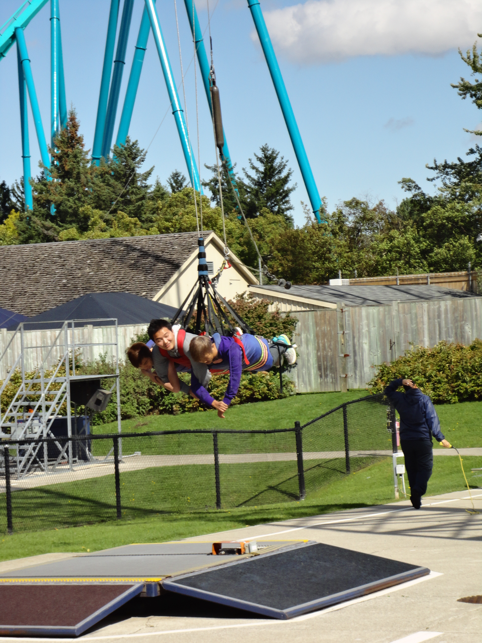 Pessoas no Xtreme Skyflyer, no Canada's Wonderland.